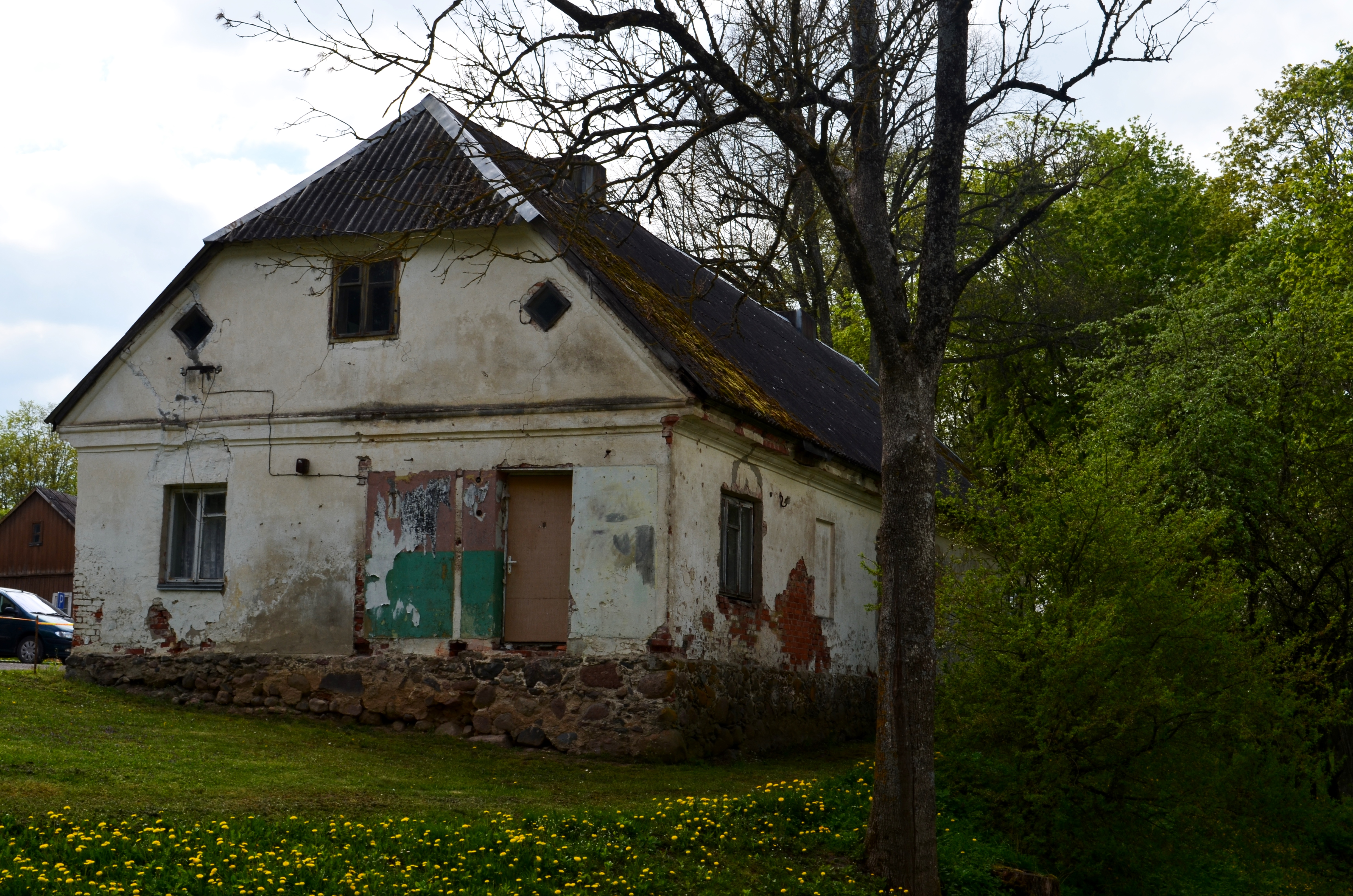 Ilguvos dvaro špitolė, Šakių raj.